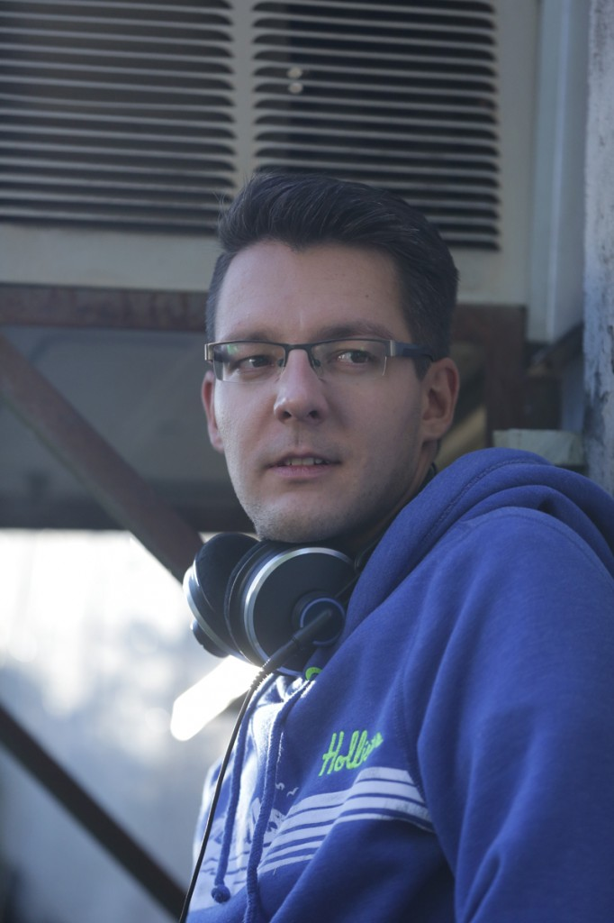 Moderator, Sprecher